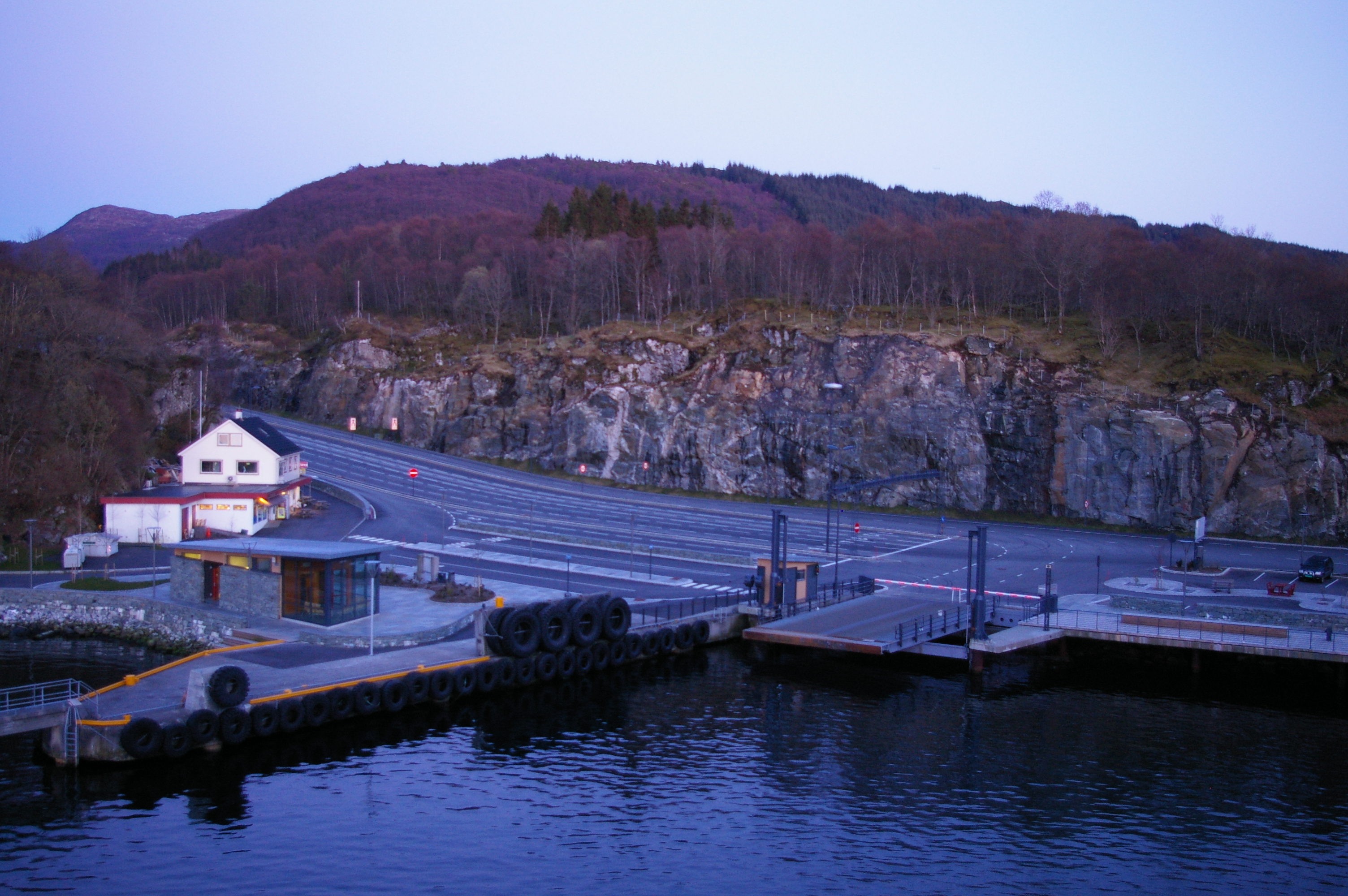 Sandvikvåg ferjekai, Fitjar, Norway